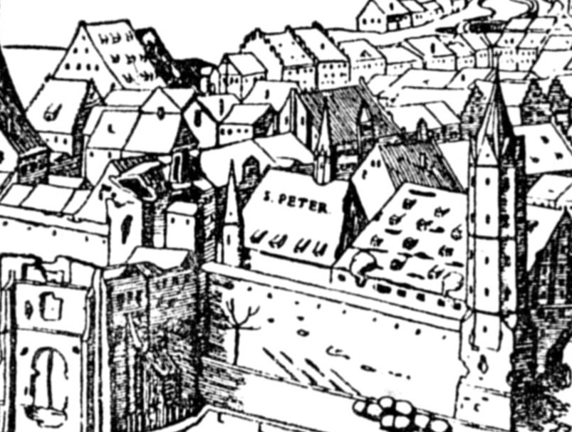 Belagerung von Leipzig 1547